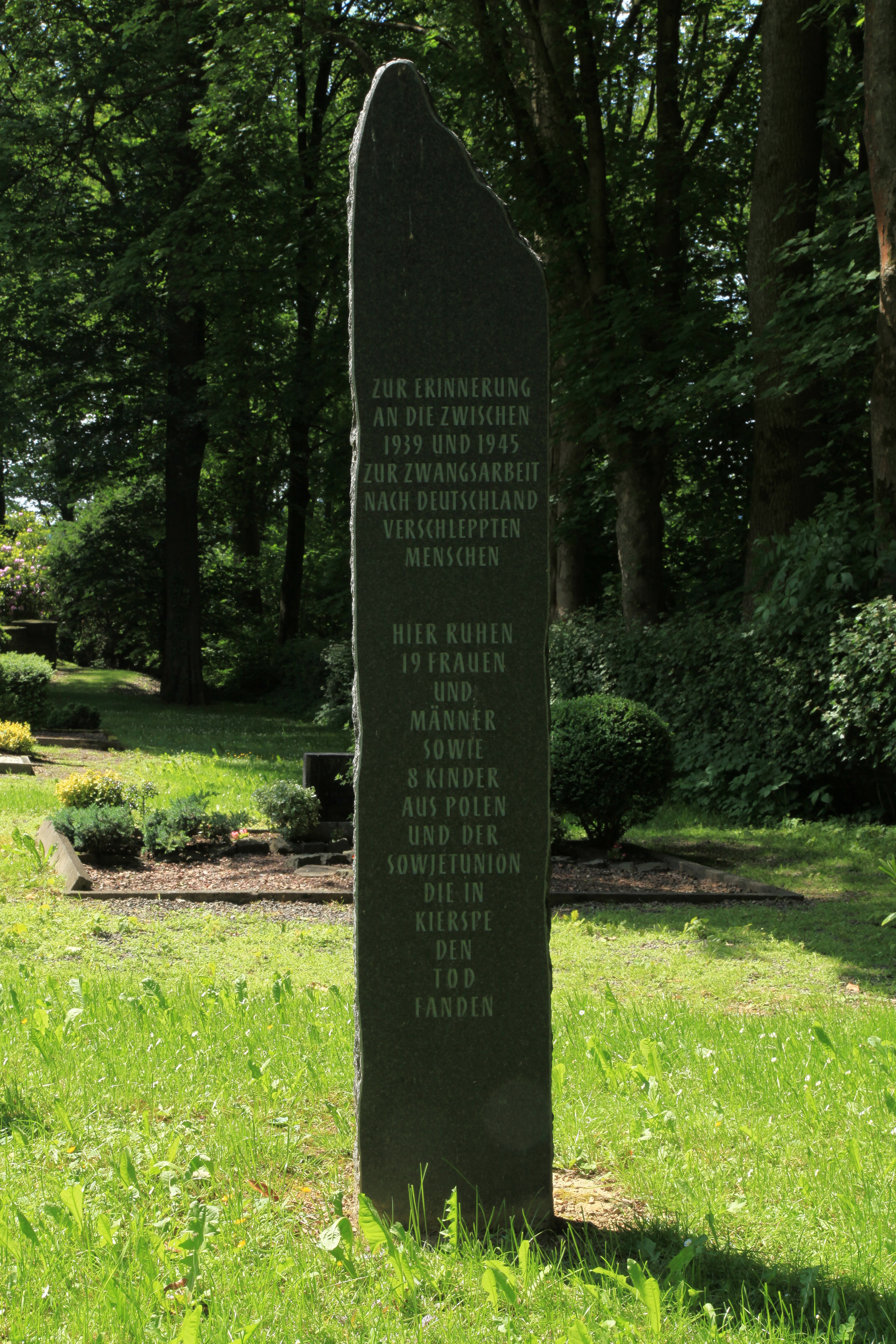 Zwangsarbeiter-Denkmal am Zwangsarbeiterfriedhof auf dem Städtischen Friedhof, Büscherweg in Kierspe